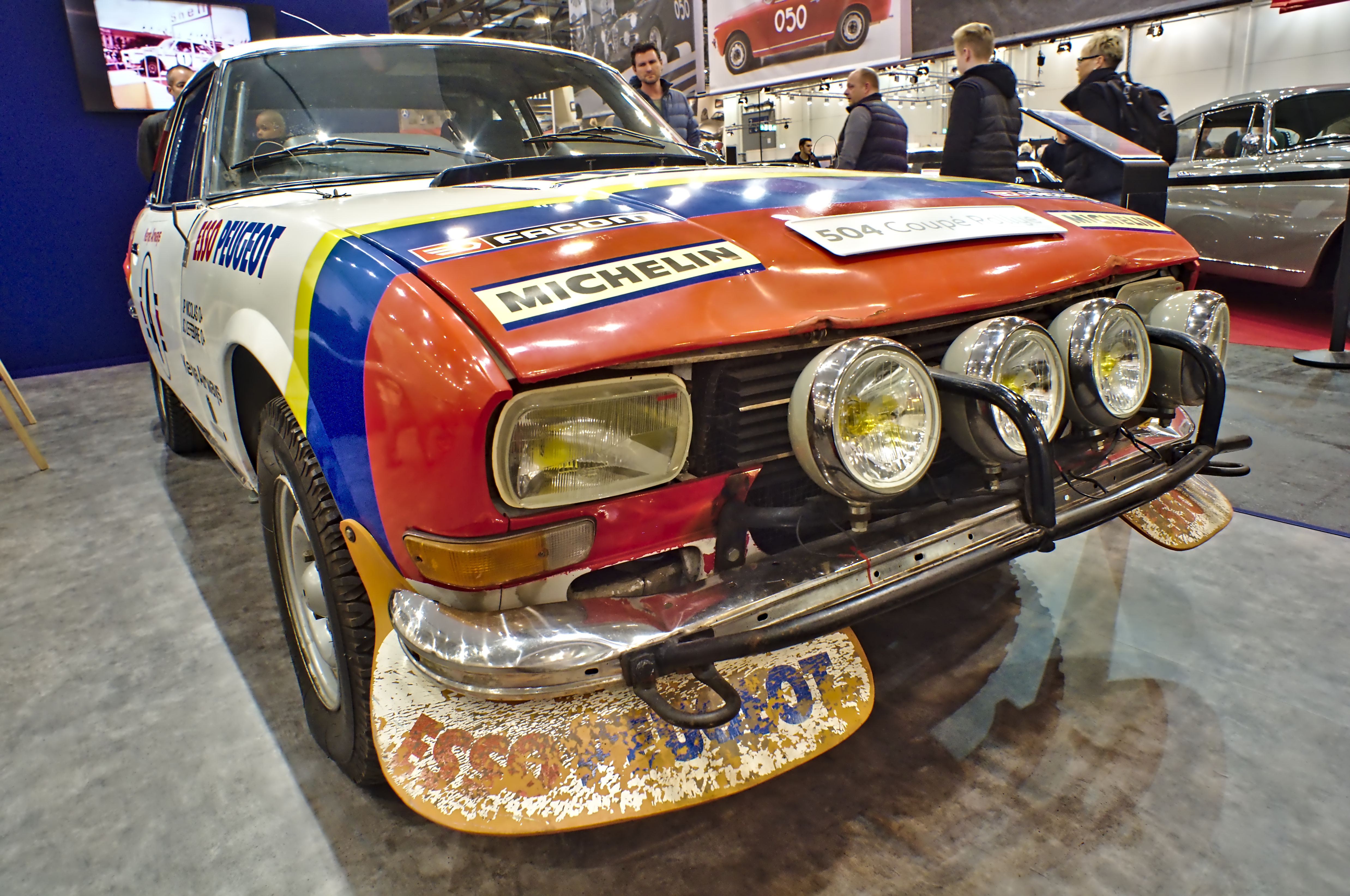 Techno Classica 2019